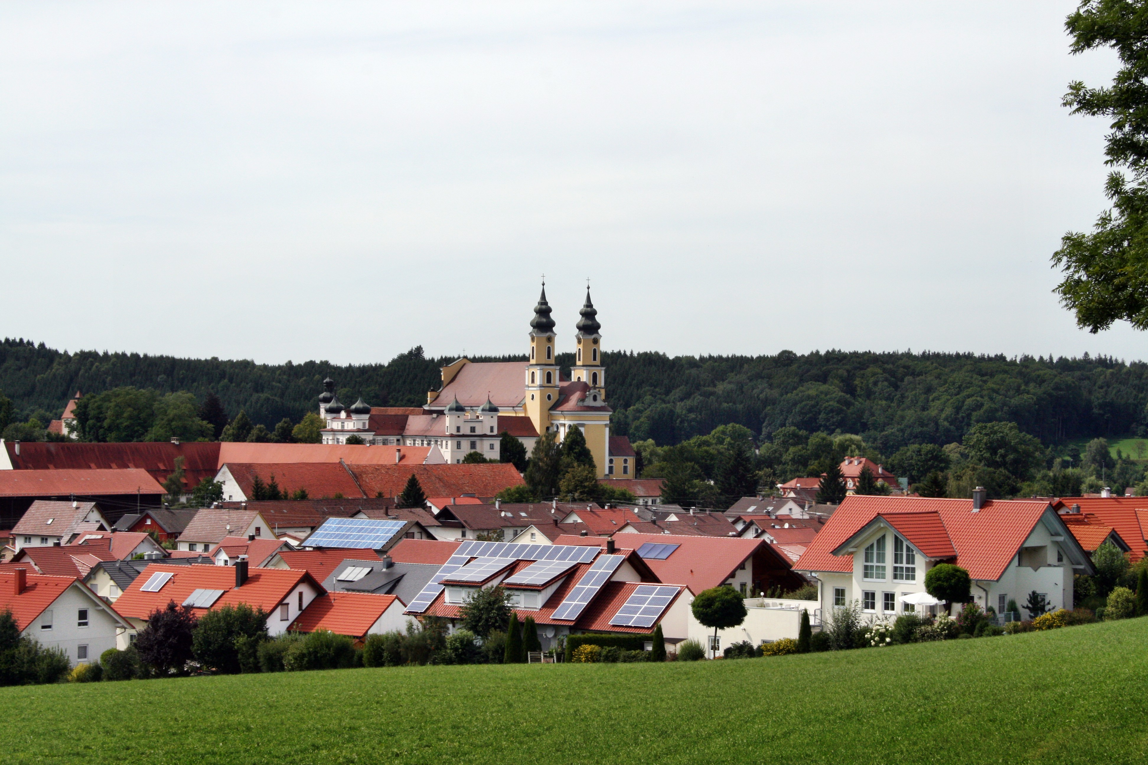 St Verena, Rot an der Rot